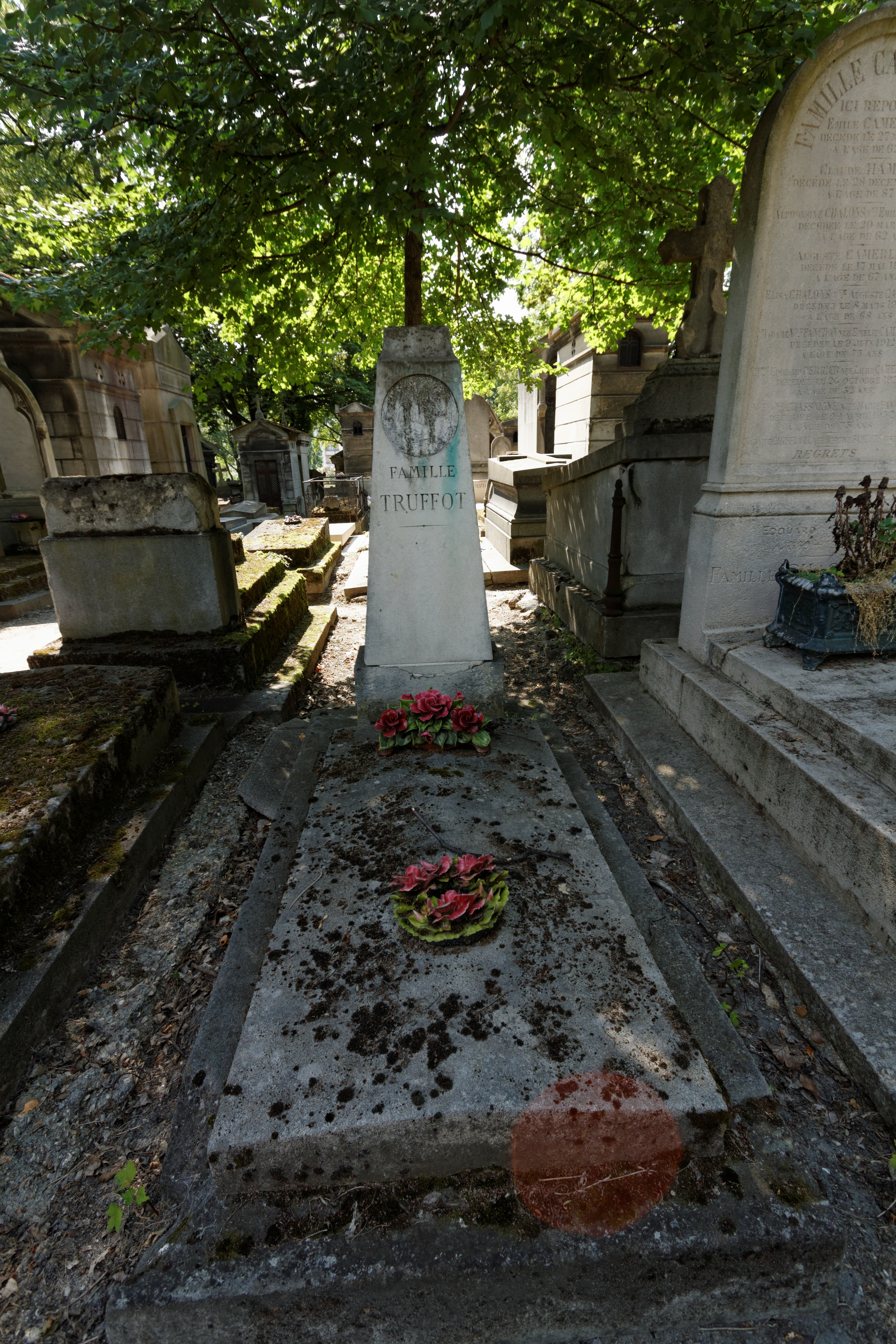 À l'origine, la stèle était ornée d'un médaillon en bronze d'Émile-Louis Truffot et surmontée d'un buste en bronze de Georges Truffot.